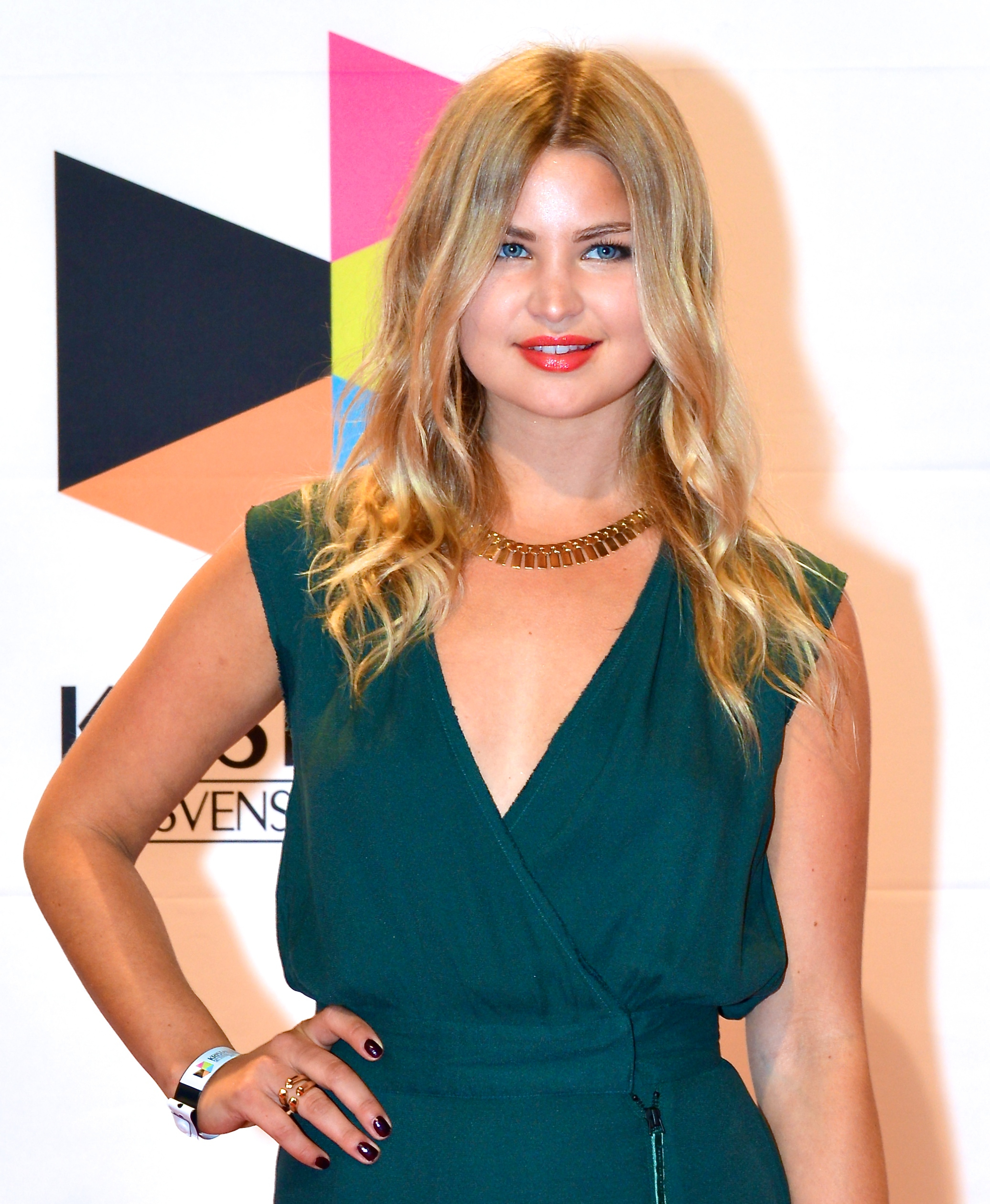 Jennifer Åkerman på Kristallen-galan den 30 augusti 2013.